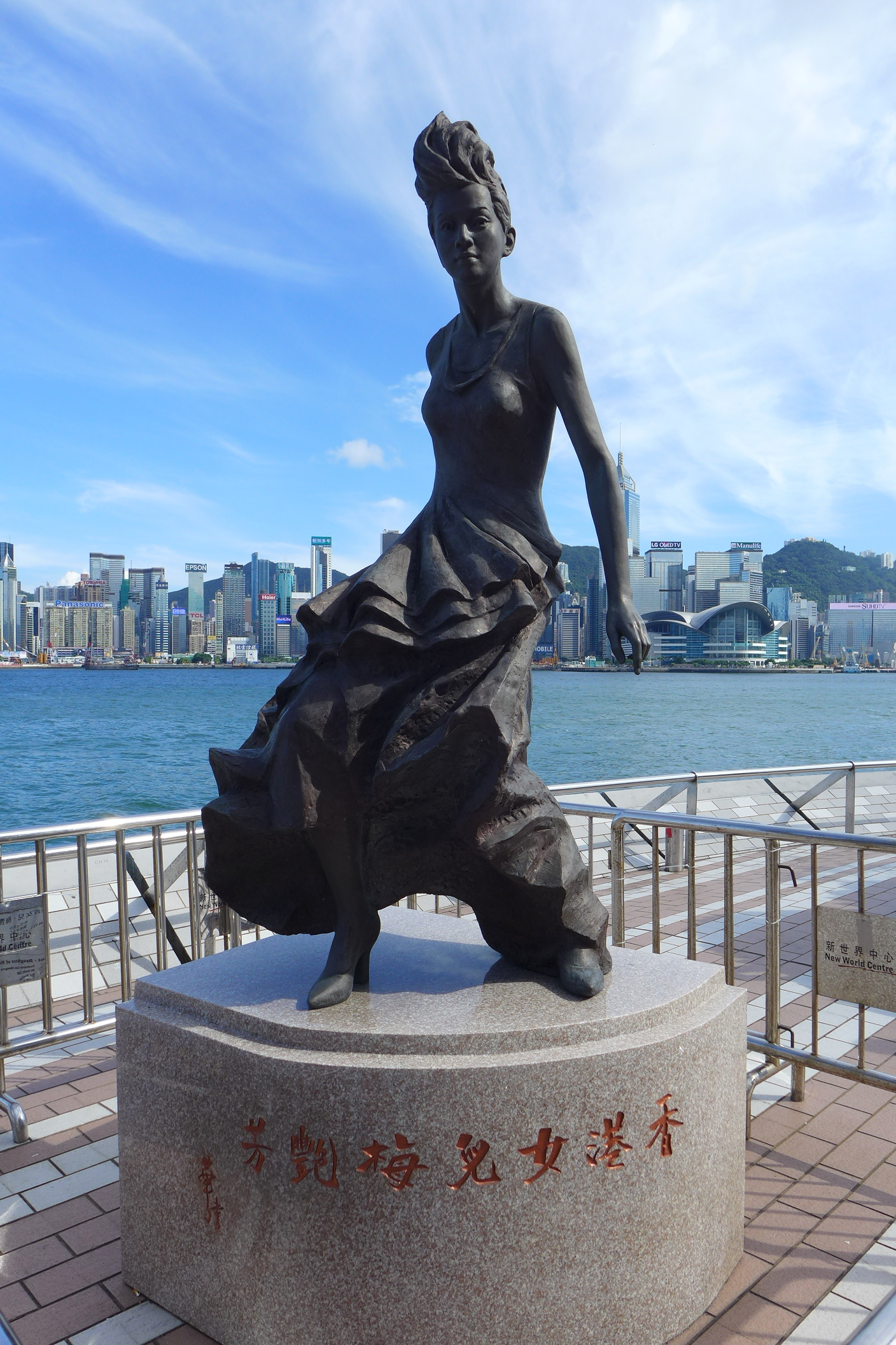 Star Avenue Anita Mui Sculpture